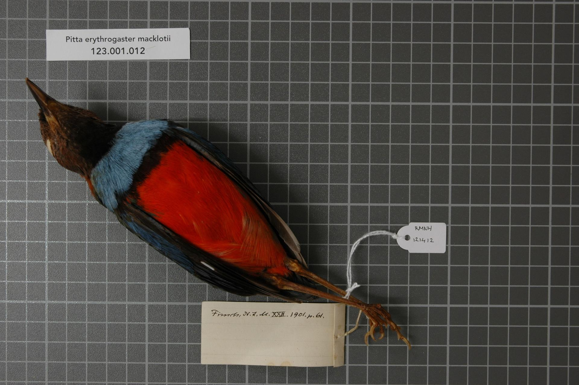 Pitta erythrogaster macklotii Temminck, 1834